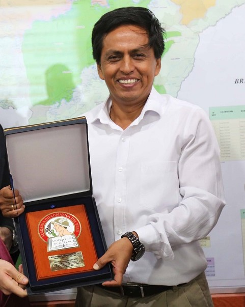 Fernando Meléndez Celis, gobernador regional del departamento de Loreto periodo 2015-2018